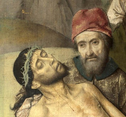 detail